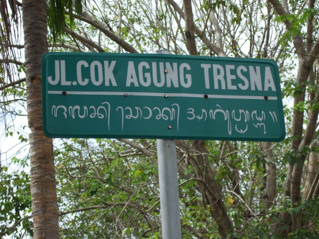 Bilingual street sign in Denpasar, Bali, Indonesia